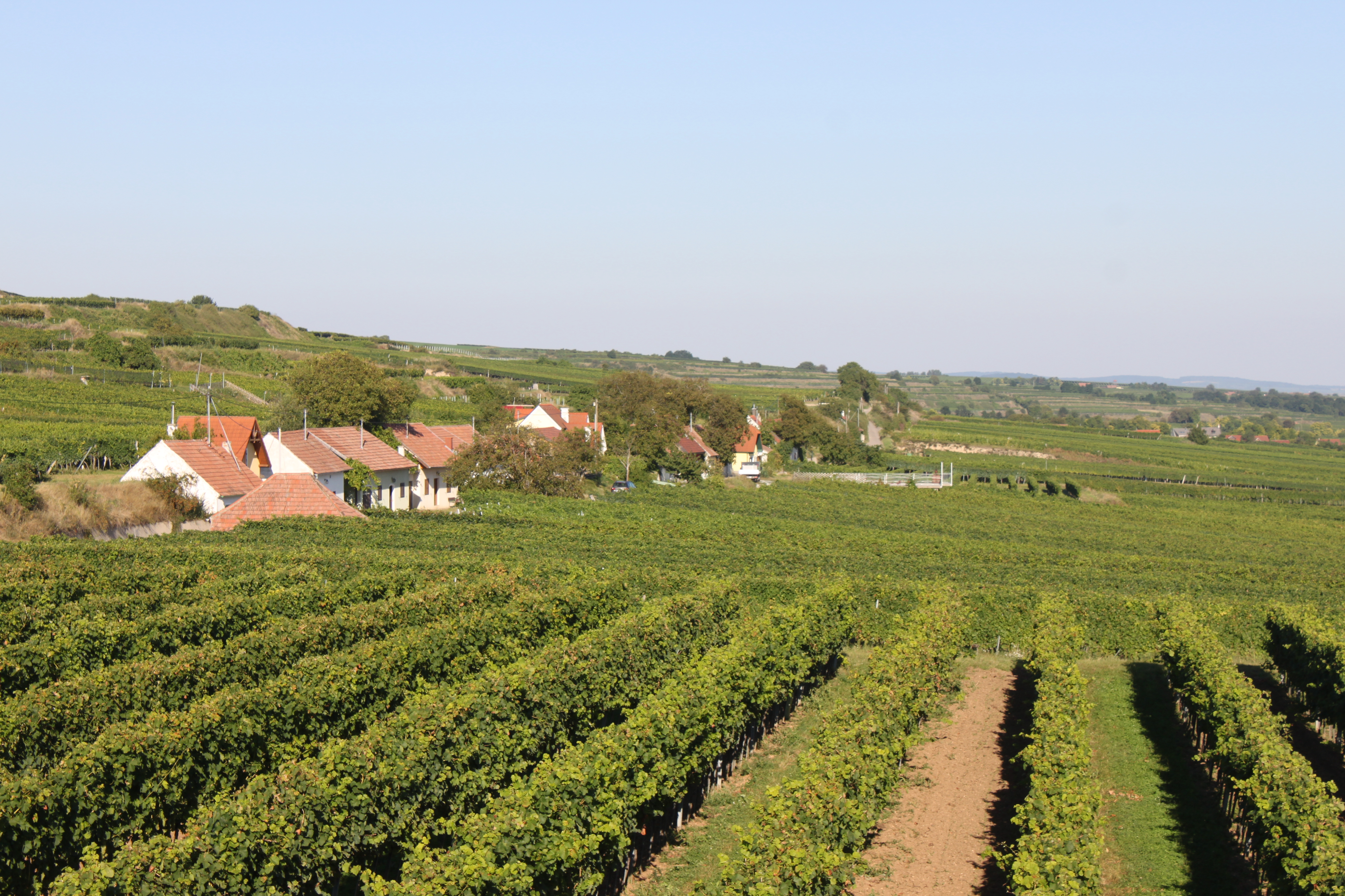 Kellergasse in der KG Feuersbrunn in Grafenwörth, Kellergasse Loner-Broidl, östlich Aussichtswarte Engabrunn, fotografiert von der Aussichtswarte Engabrunn